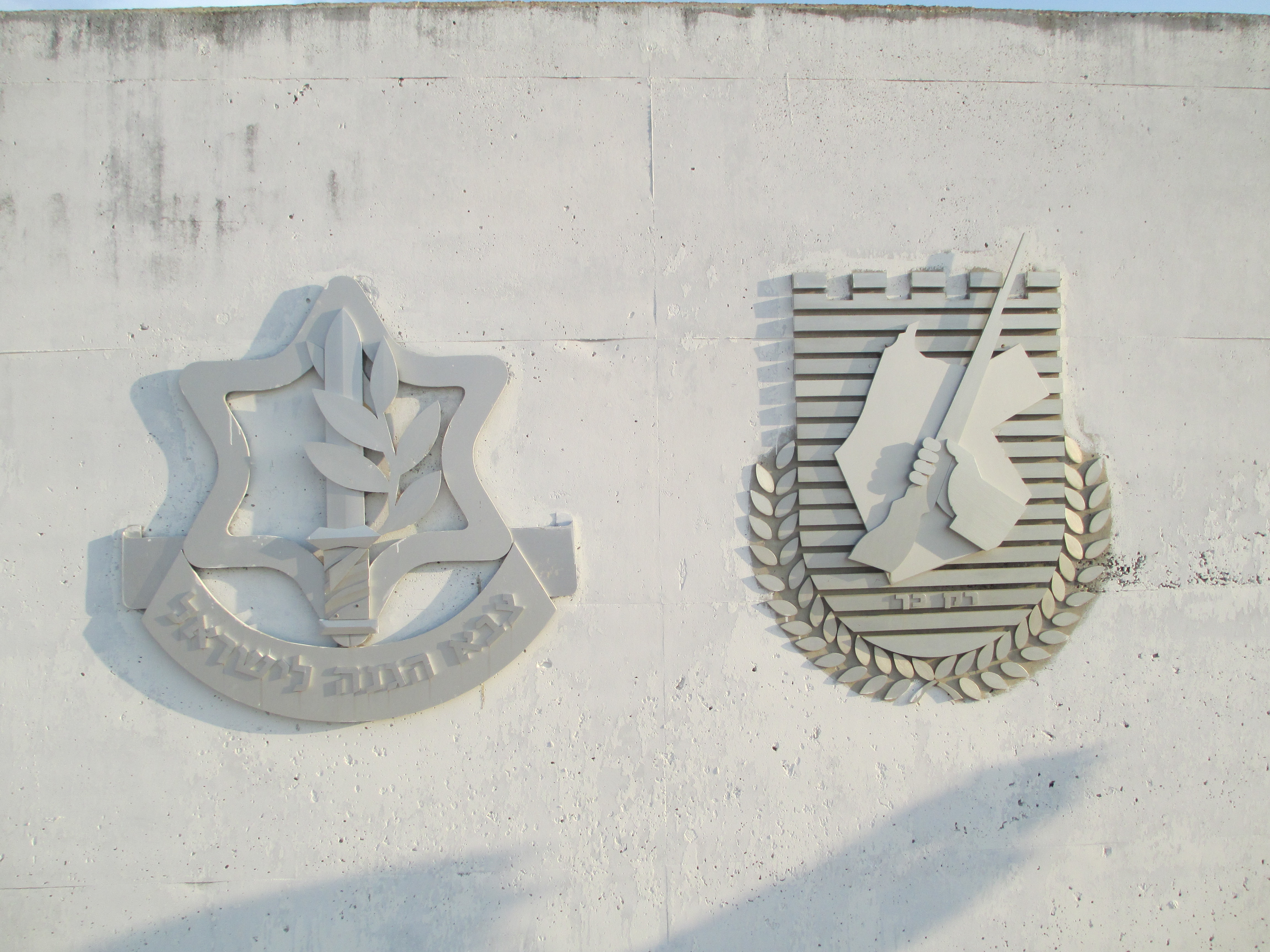 סמלי אצ"ל וצה"ל באנדרטת אצ"ל ברמלה